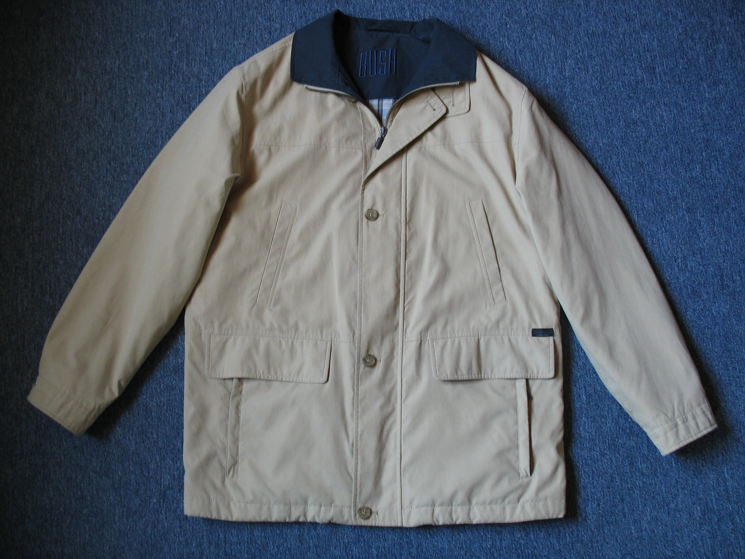 Description=